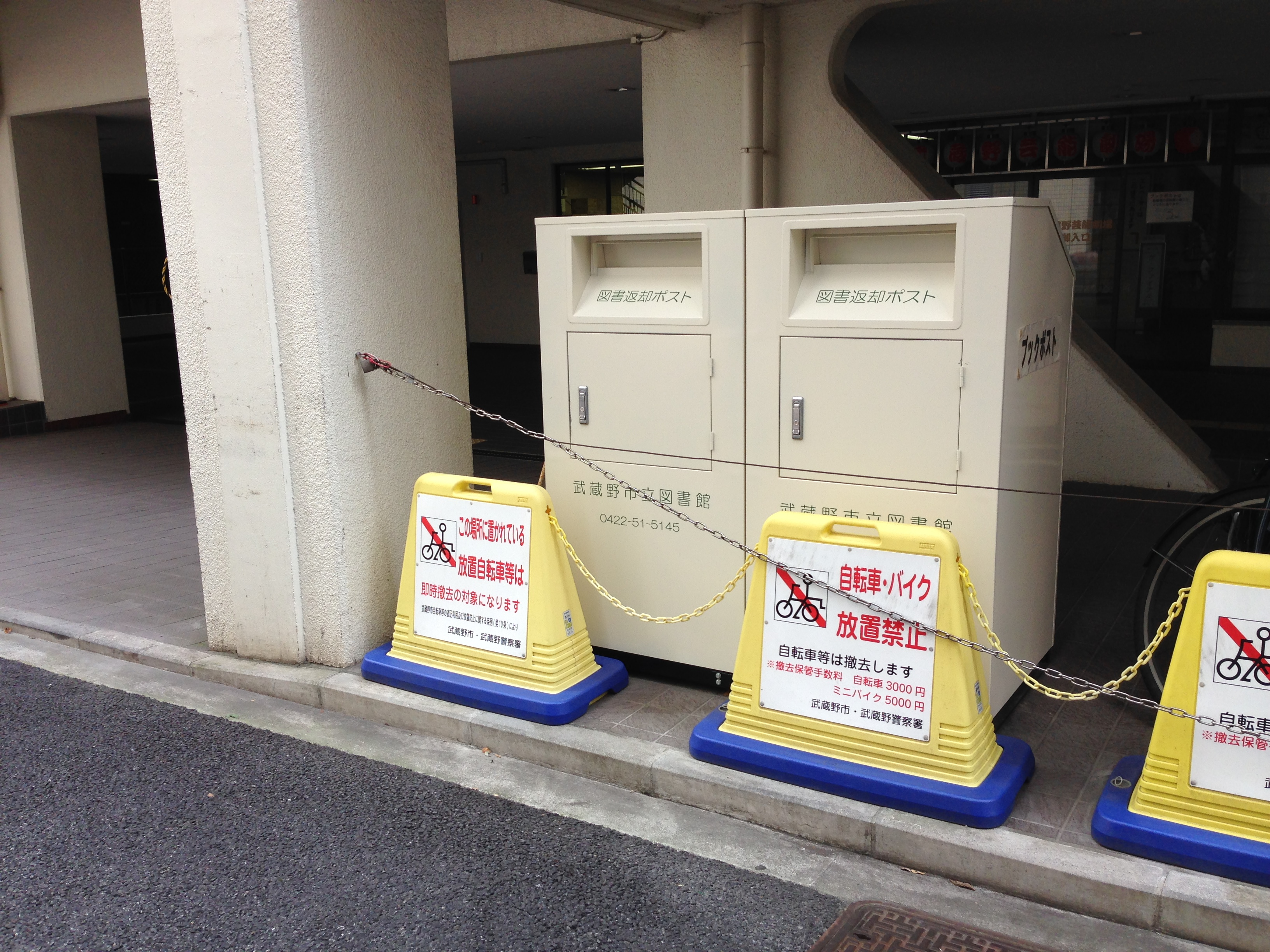 武蔵野芸能劇場前ブックポスト（東京都武蔵野市）